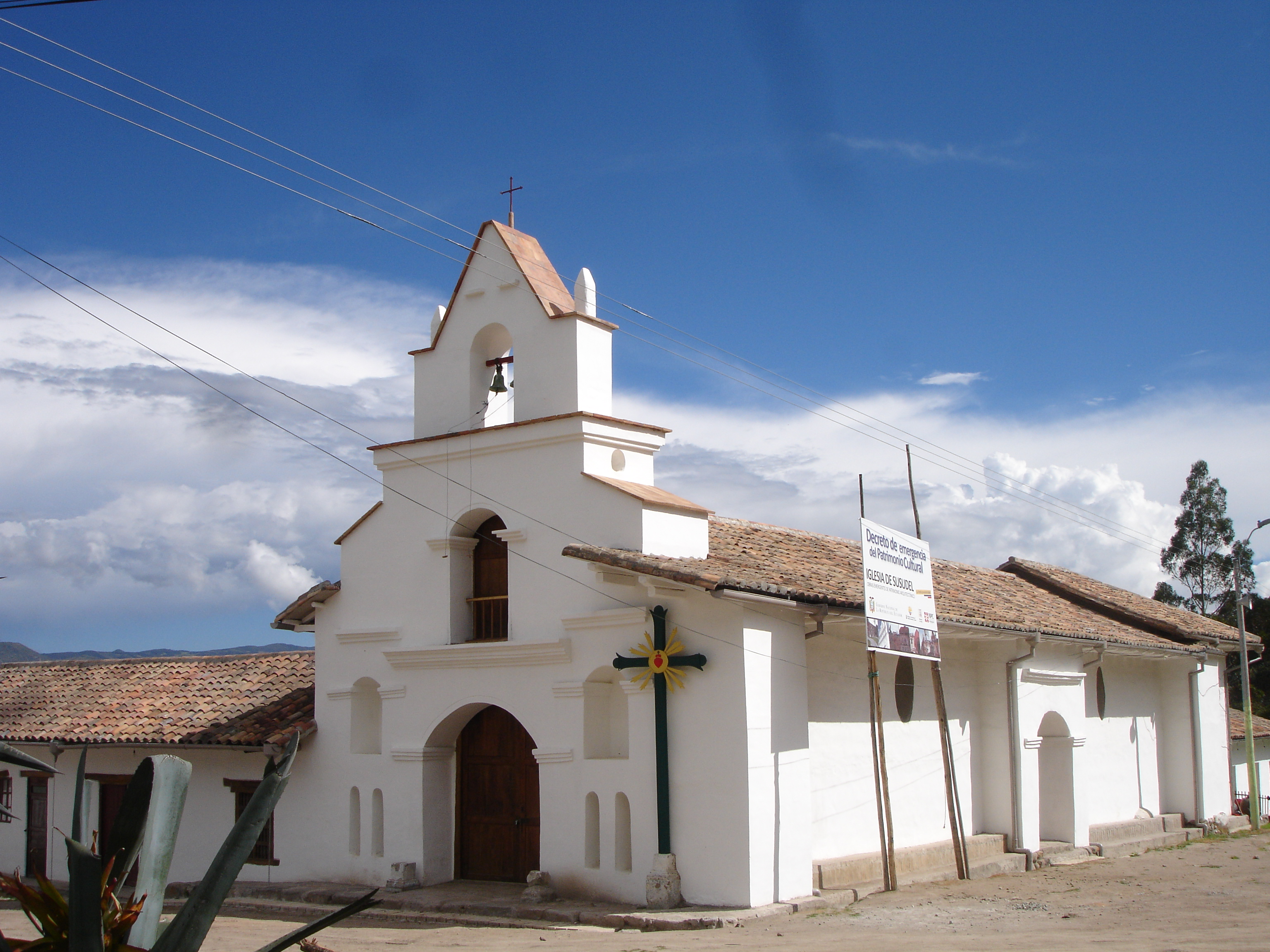 Un recurso cultural importante es la Iglesia que data de 1752 , es considerada como una auténtica joya cultural e histórica, de ahí que se gestiona su inclusión como inmueble histórico de la época colonial, con el título de "Relicario del Patrimonio Cultural Rural del Ecuador". En la parte del altar mayor se encuentra un retablo de madera de estilo barroco, con pan de oro y plata, posiblemente agregado un siglo y medio posterior a la construcción. En los murales sobresalen las imágenes bíblico cristianas de Cristo Yaciente, María Magdalena y San Juan.